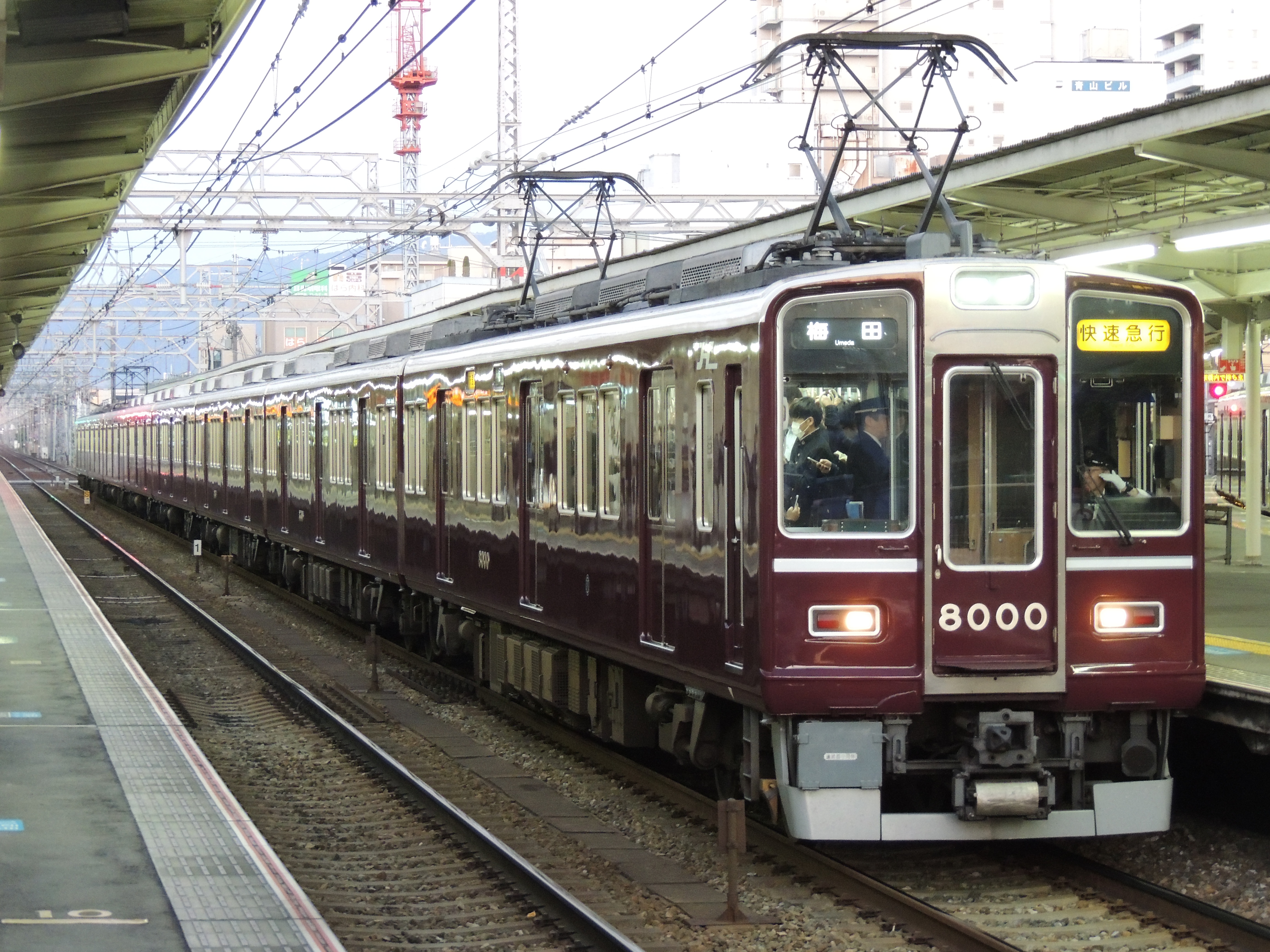 hankyu 8000F Rapid Express